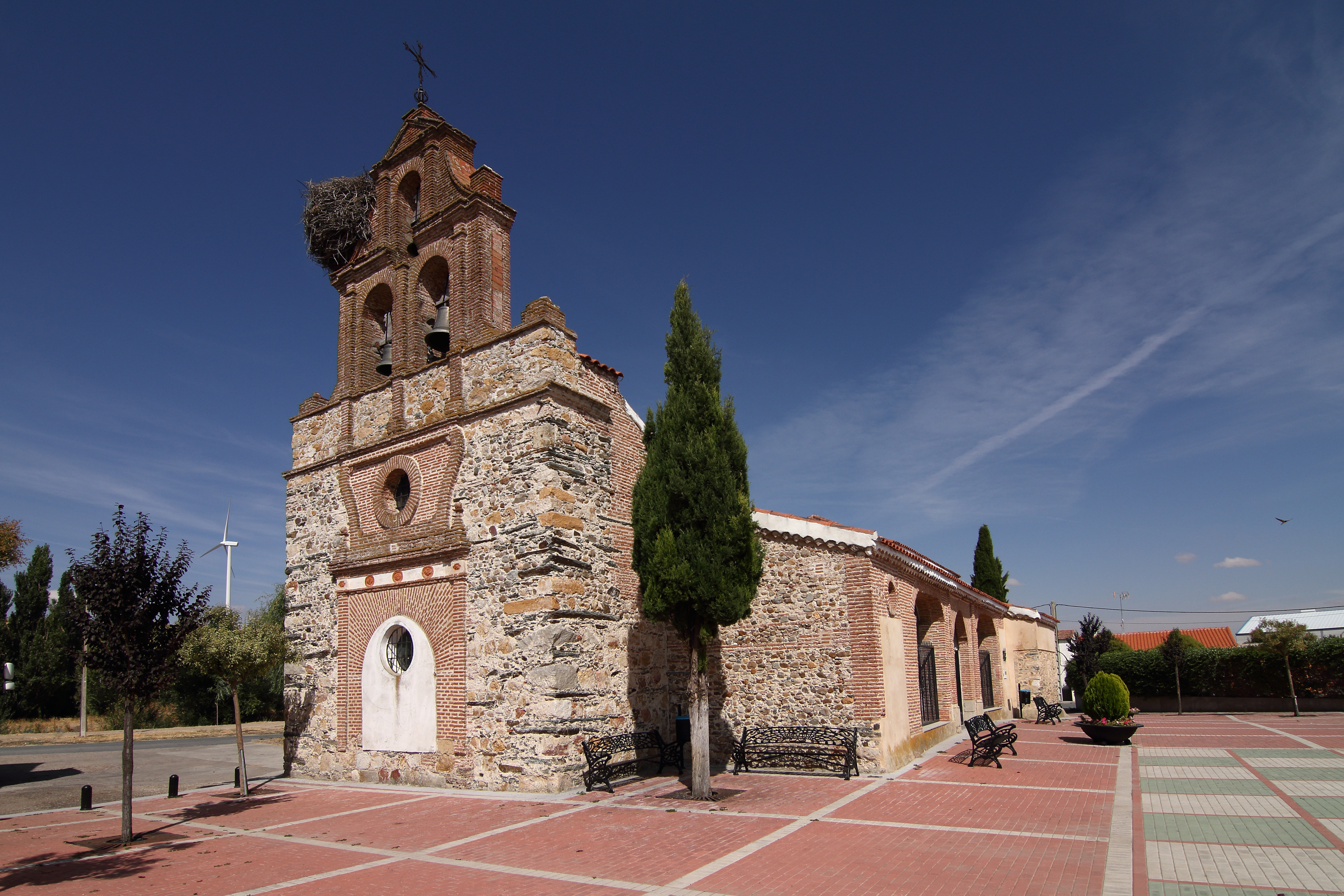 Iglesia Parroquial San Juan Bautista en Garcihernandez